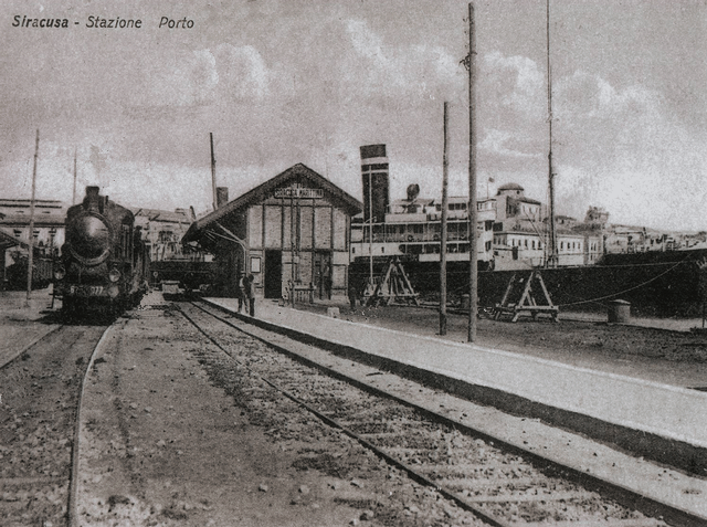 Stazione Siracusa Marittima